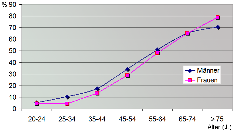 Geschätzte Prävalenz von Herz-Kreislauferkrankungen in den USAestimated prevalence of cardiovascular disease in the U.S.